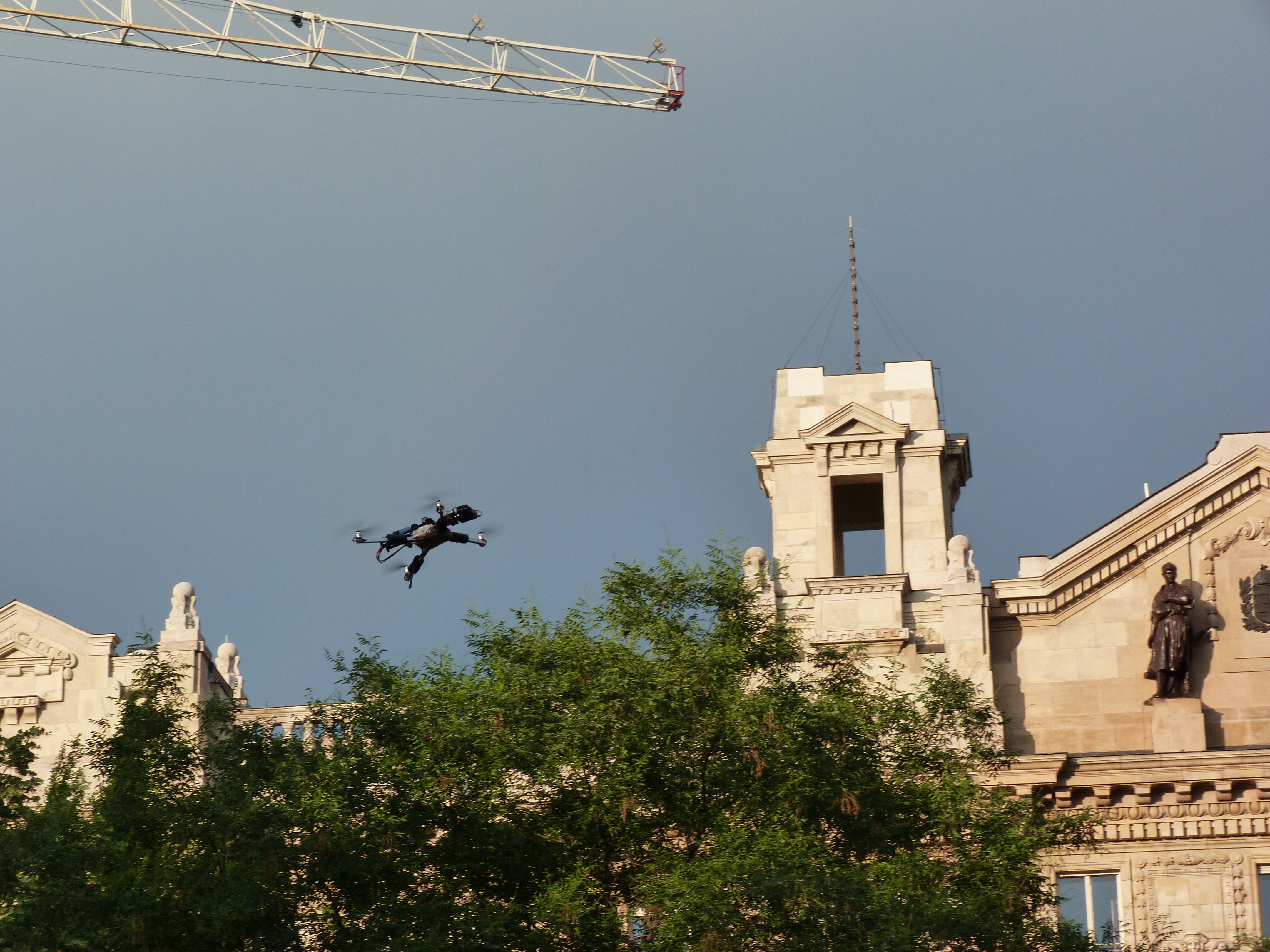 A felvétel 2013. június 8 –án, szombaton készült Budapesten, a Szabadság téren. The Carbonfools együttes. Drón a közönség felett. Belváros Lipótváros Önkormányzata 2013. Június 7-9 között, három napos Belvárosi Fesztivált rendezett három helyszínen: a Szabadság téren, az Erzsébet téren és a Zrinyi utcában. Az idén hetedik alkalommal megrendezésre került Belvárosi Fesztivált Magyarország legnagyobb ingyenes fesztiváljaként tartják számon. Rogán Antal, Belváros Lipótváros polgármestere hangsúlyozta, hogy a szürke hétköznapok rutinja mellett a kikapcsolódásra, szórakozásra is szakítsunk időt. ©© Published under Creative Commons in the Metapolisz DVD line. All of the photos and vids in the Metapolisz DVD line are under Creative Commons and can be used even for commercial – for profit – purposes. Recommended Citation Derzsi Elekes Andor: Metapolisz DVD line